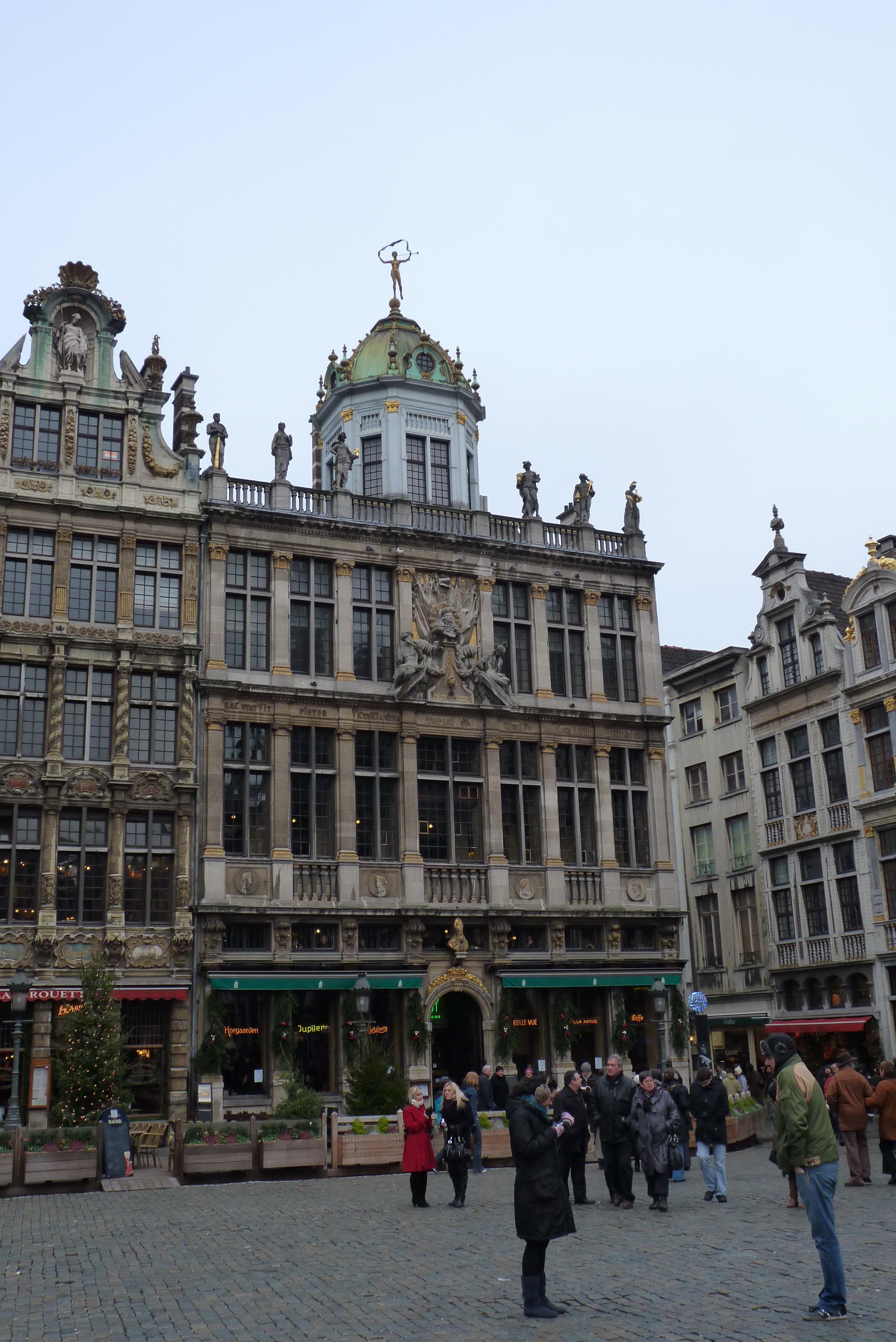 Cette image a été créée par Savant-fou Elle est donc sous licence libre. Si jamais vous avez besoin d'autres clichés sur ce thème, contactez-moi ! Merci de créditer: Image de Savant-fou ( - //commons.wikimedia.org/wiki/File:Grand_Place_Brussels.JPG). If you need other pictures about this subject, please feel free to contact me. Please credit : Picture of Savant-fou ( - //commons.wikimedia.org/wiki/File:Grand_Place_Brussels.JPG).